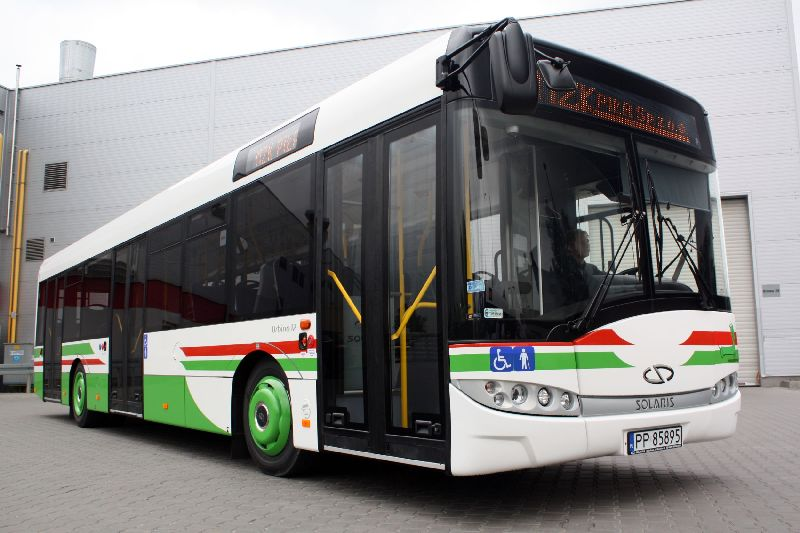 Urbino 12